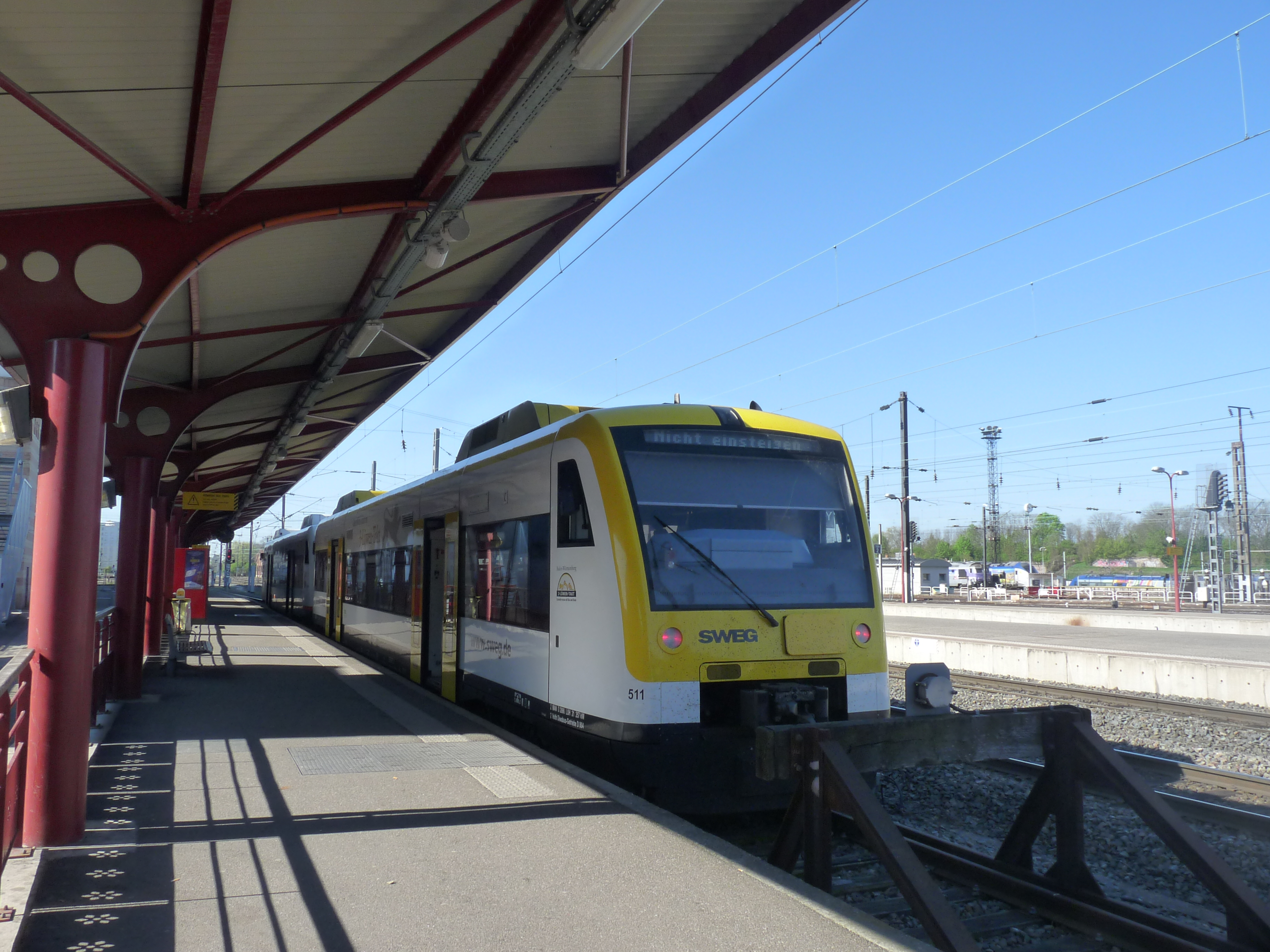 station Staatsburg